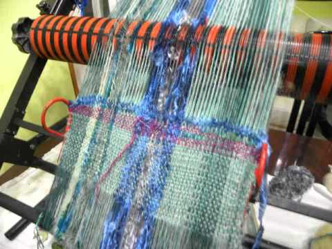 SiGa statve za ročno tkanje, ki sta jih leta 1982 razvila in patentirala Edvard Sitar in Alojz Gačnik.